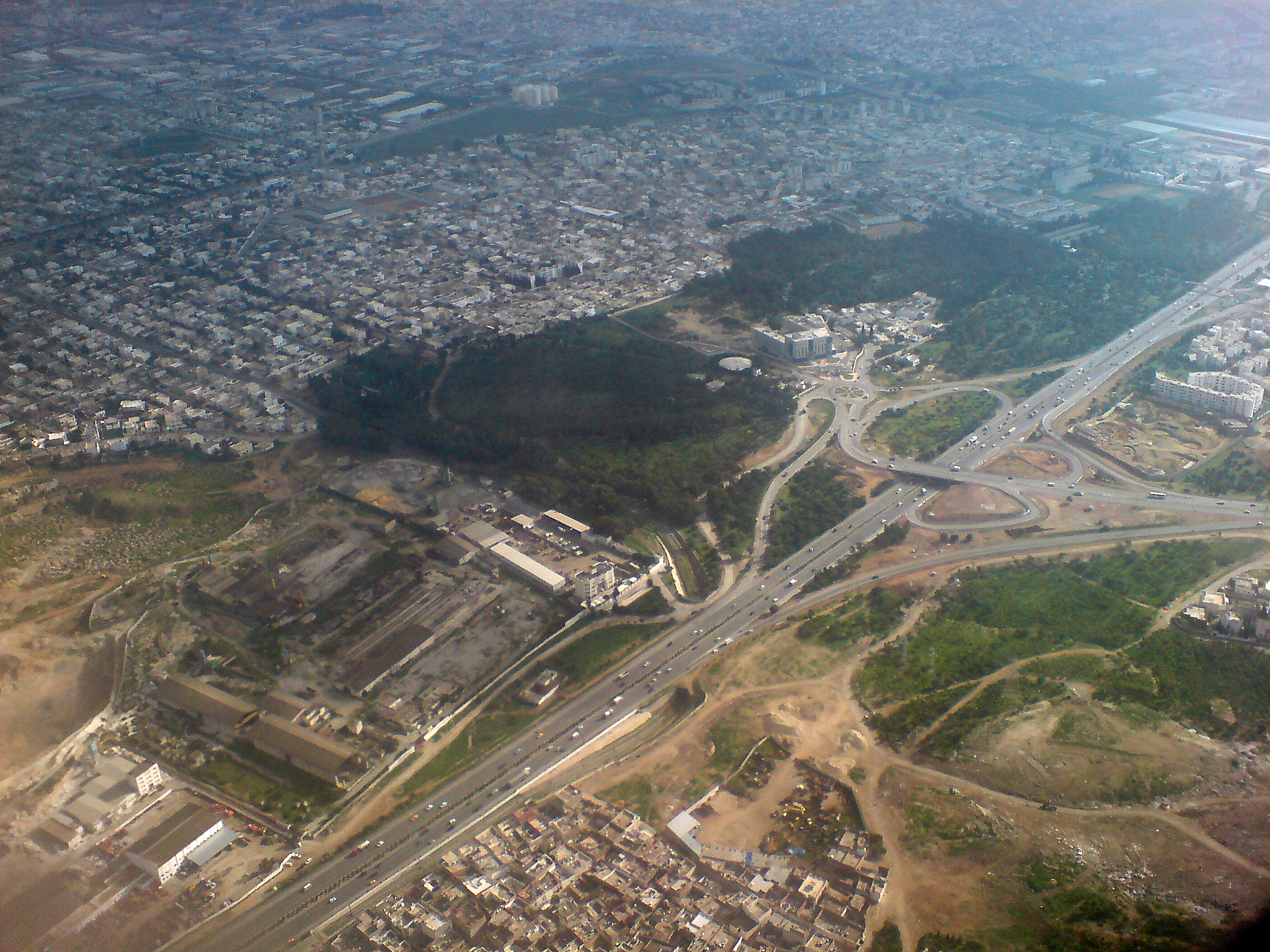 Vue aérienne de la jonction entre l'RR22 (Route Régionale n°22) et RN3 qui relie Tunis à Zaghouan et El Fahs. En haut on voit la ville de ben arous.